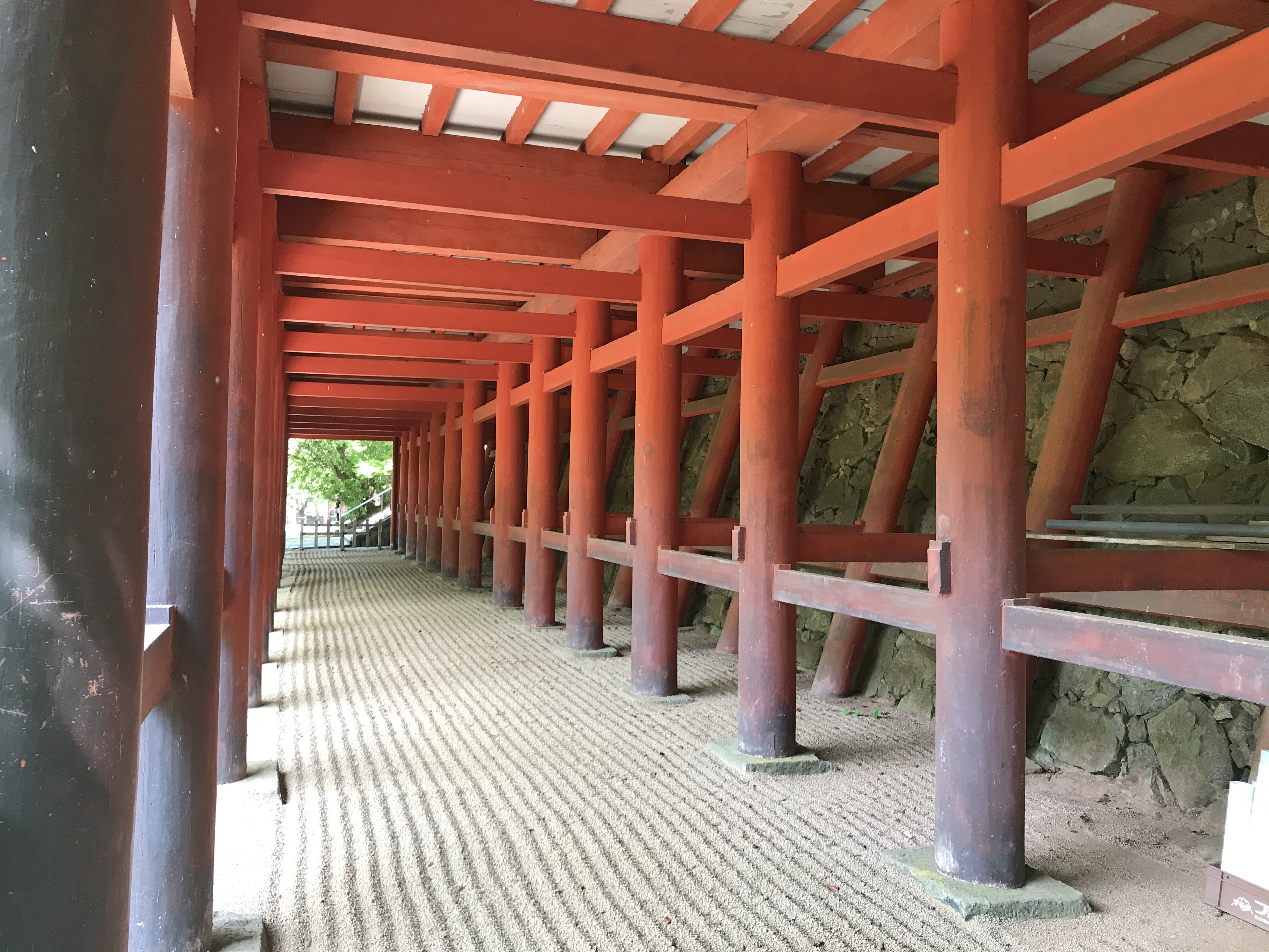 談山神社拝殿の床下